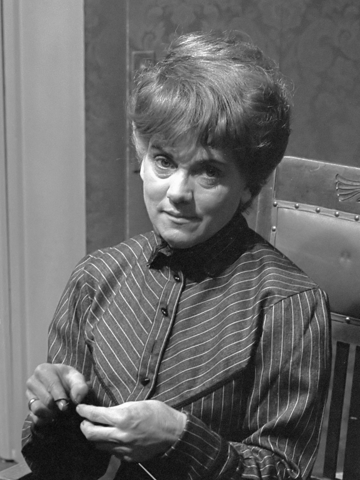 TV-spel 'De kleine waarheid' van de NCRV. Martje Spaargaren-Lutterop [Emmy Lopes Dias] in een scène 24 maart 1970